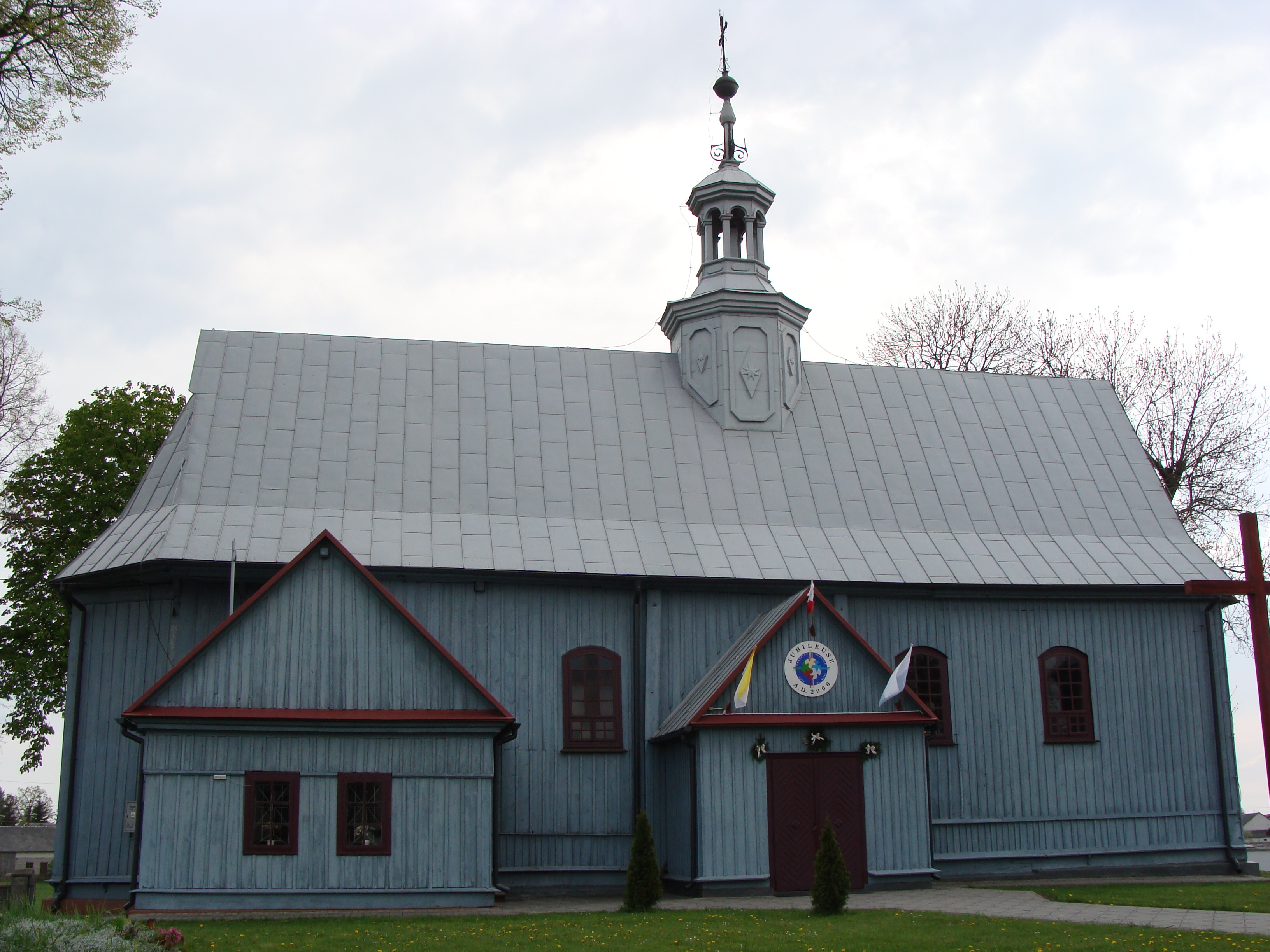 Kościół pw. Narodzenia Najświętszej Maryi Panny w Bebelnie